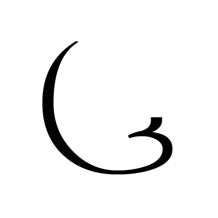 Simbol Cakra dalam aksara Jawa.